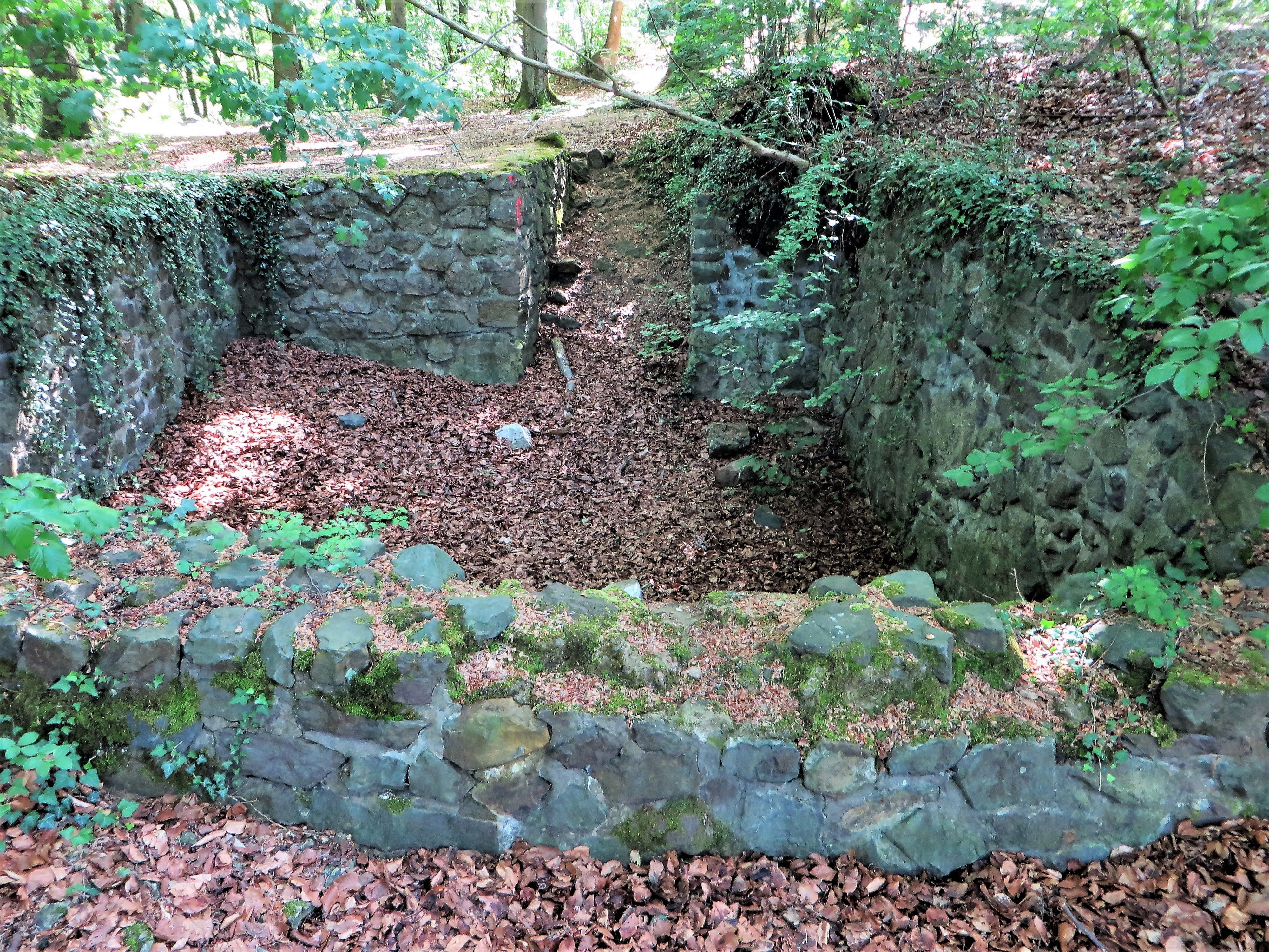 Torhaus-Mauerreste der mittelalterlichen Raffenburg in Hagen-Hohenlimburg auf dem Raffenberg (240 m) .